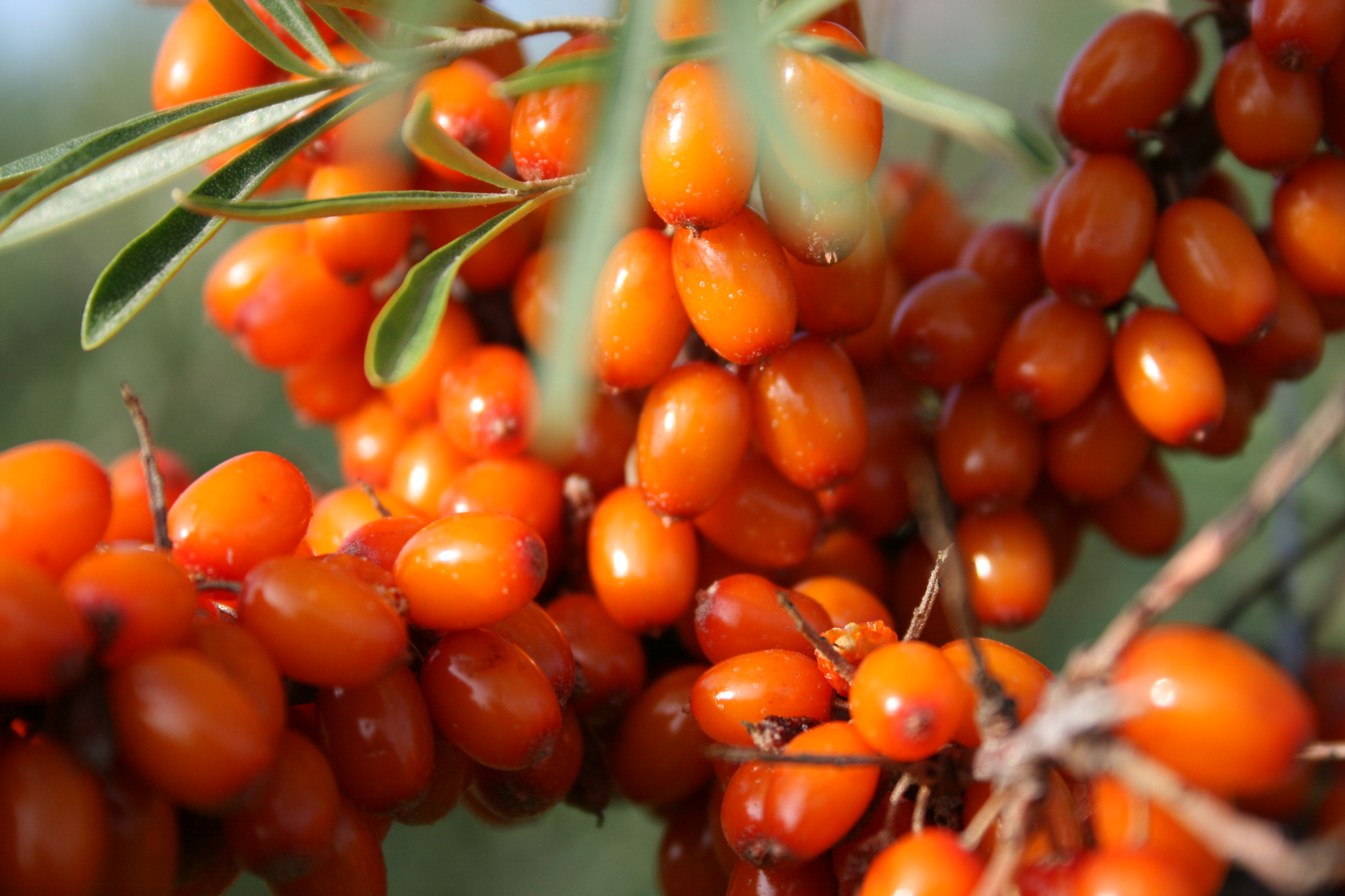 Облепиха крушиновидная в Зарубине (Джидинский район, Бурятия).